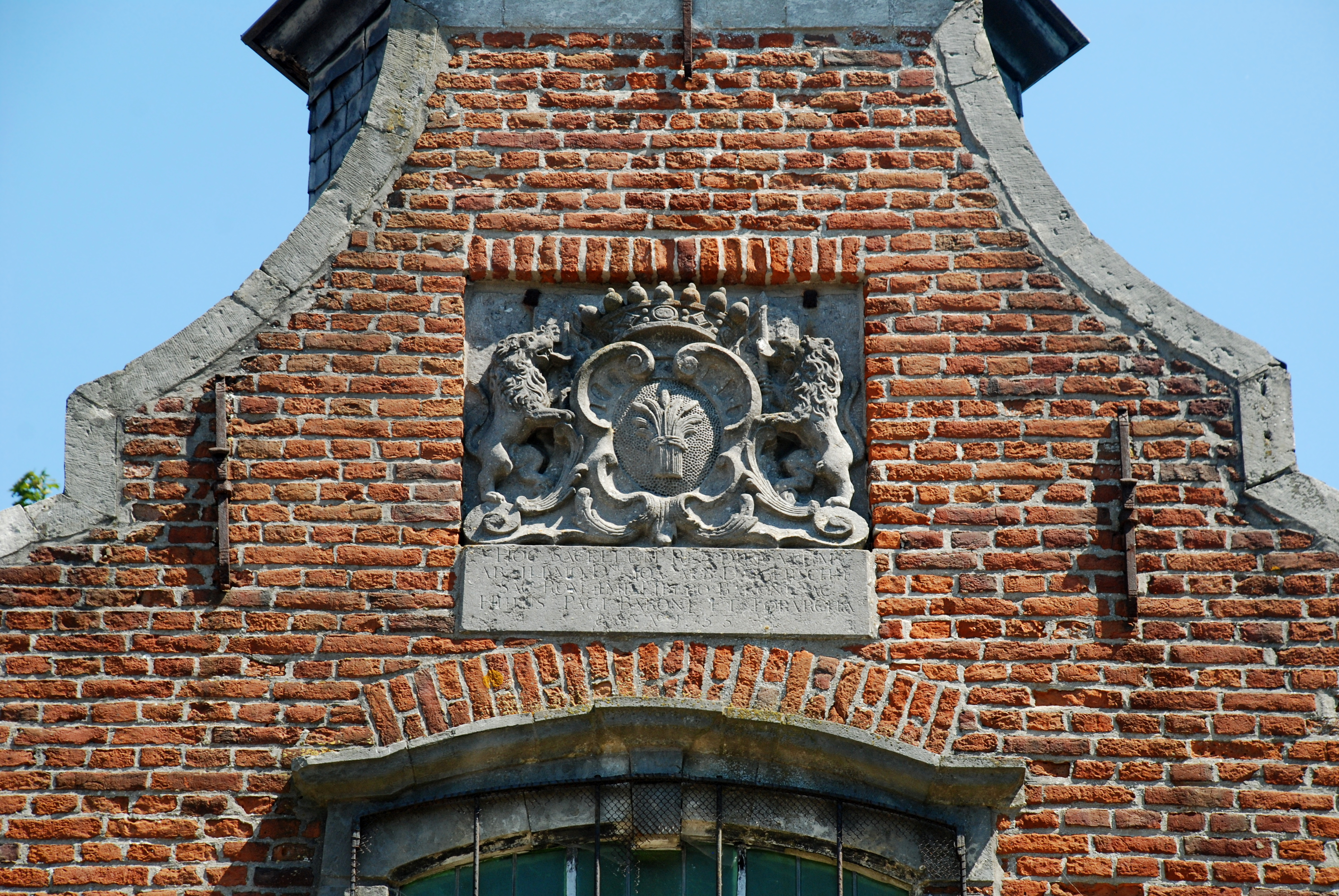 Belgique - Brabant flamand - Huldenberg - Neerijse - Chapelle Notre-Dame ten Pui